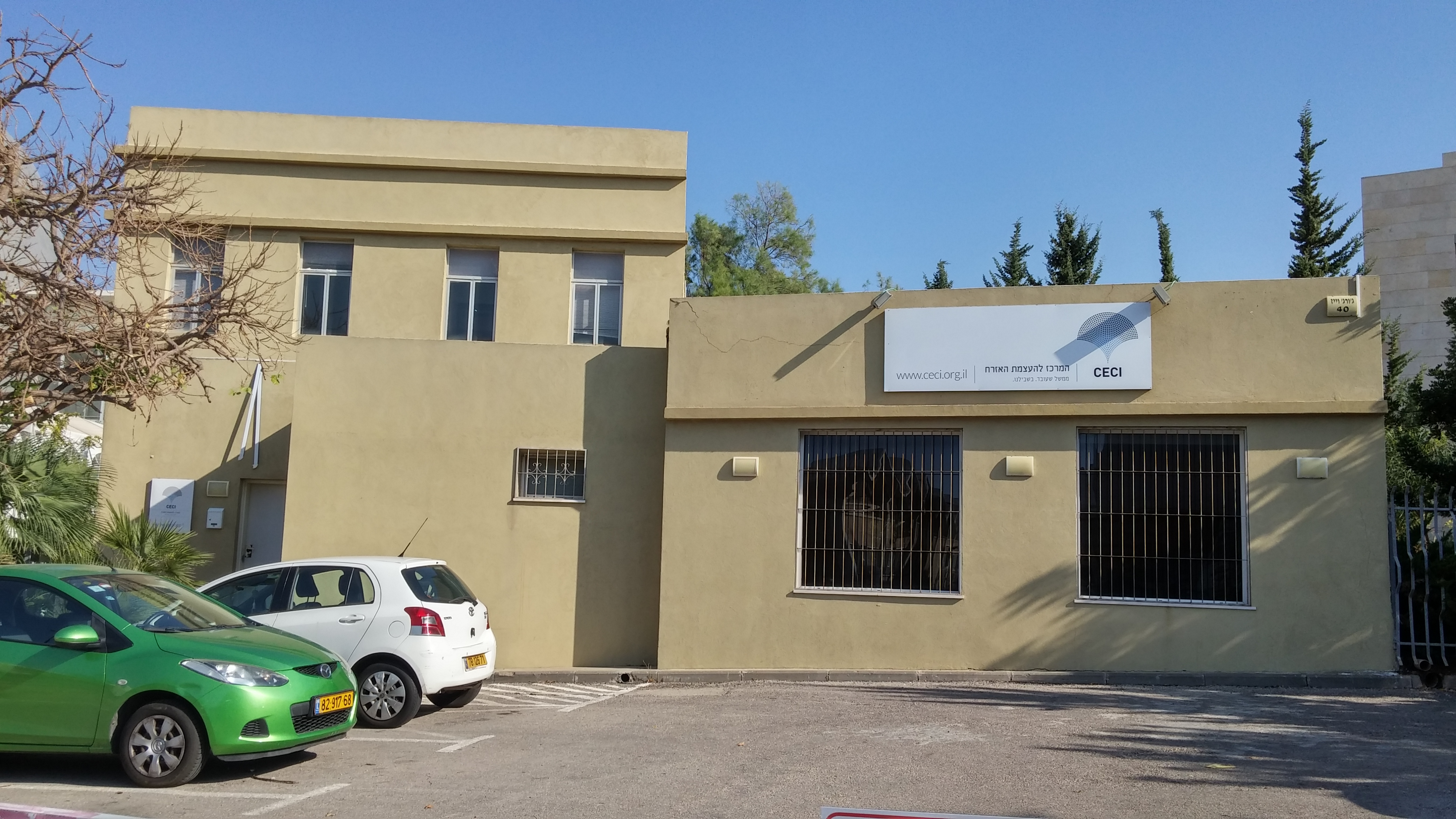 בית המרכז הישראלי להעצמת האזרח